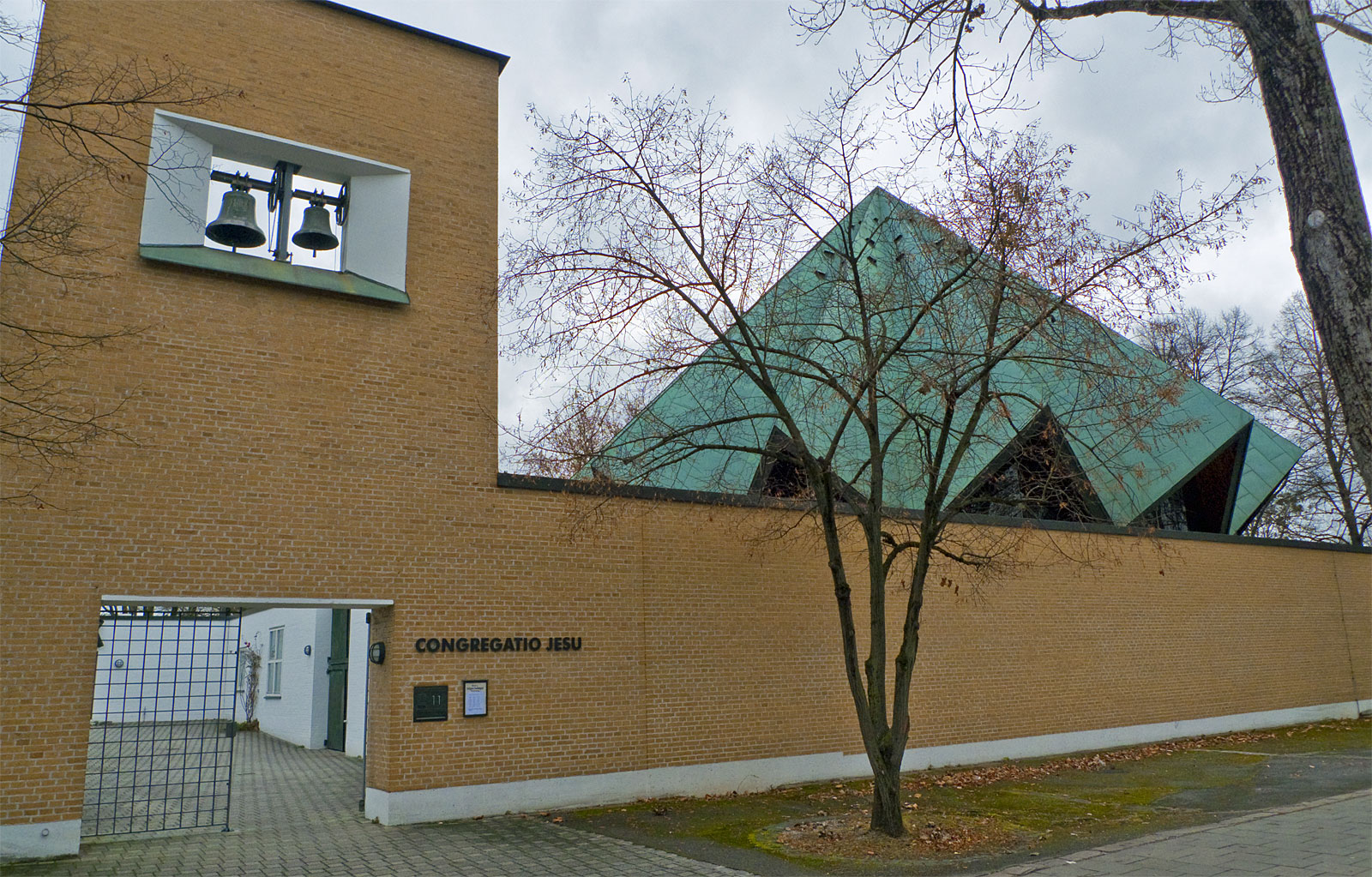 Kirche zur Heiligen Dreifaltigkeit München-Nymphenburg, Congretatio Jesu